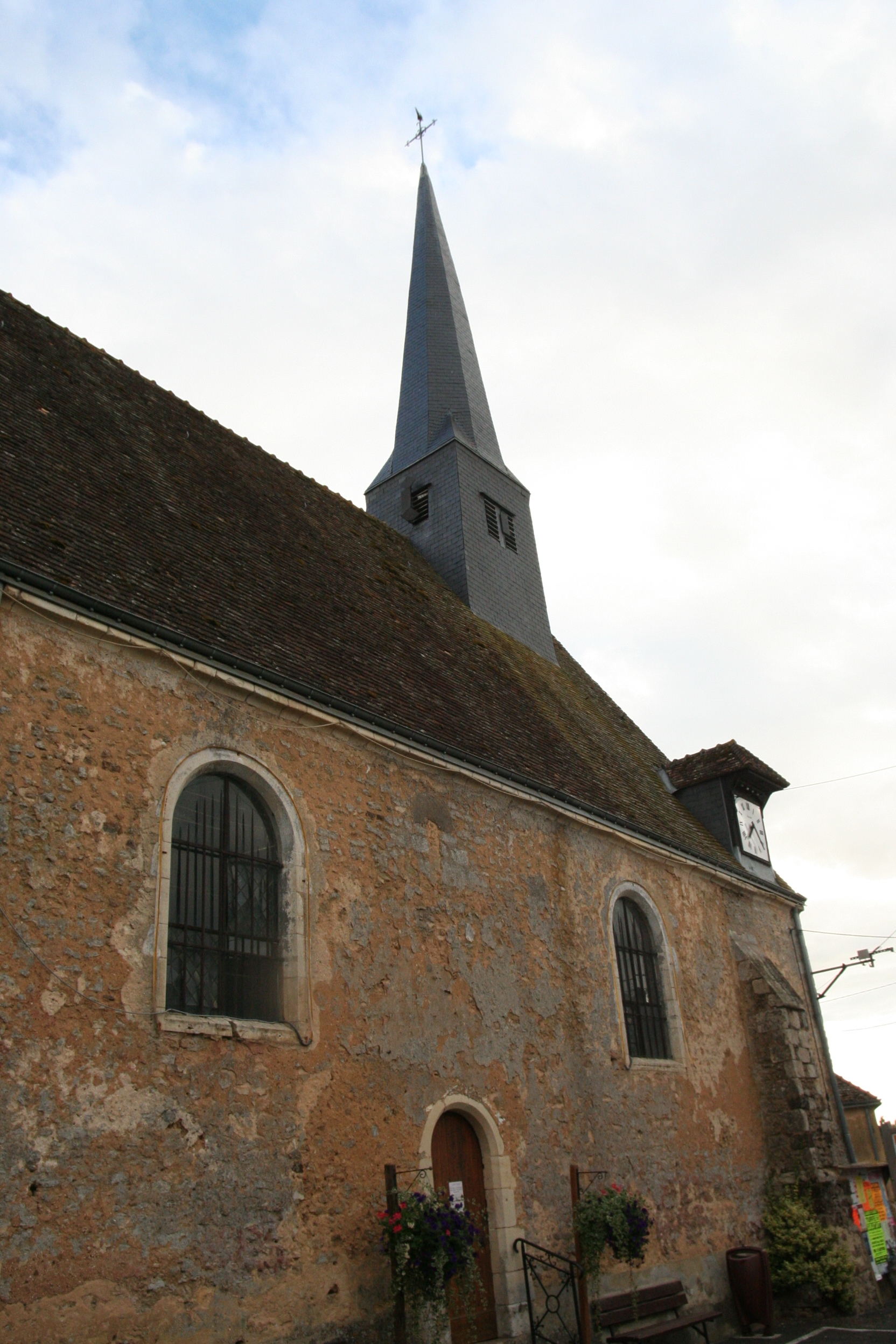 Église de la Trinité de Saint-Célerin. .